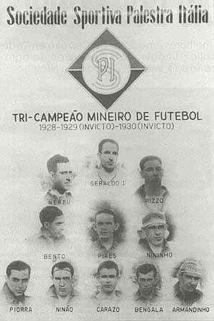 time do cruzeiro tri-campeão mineiro